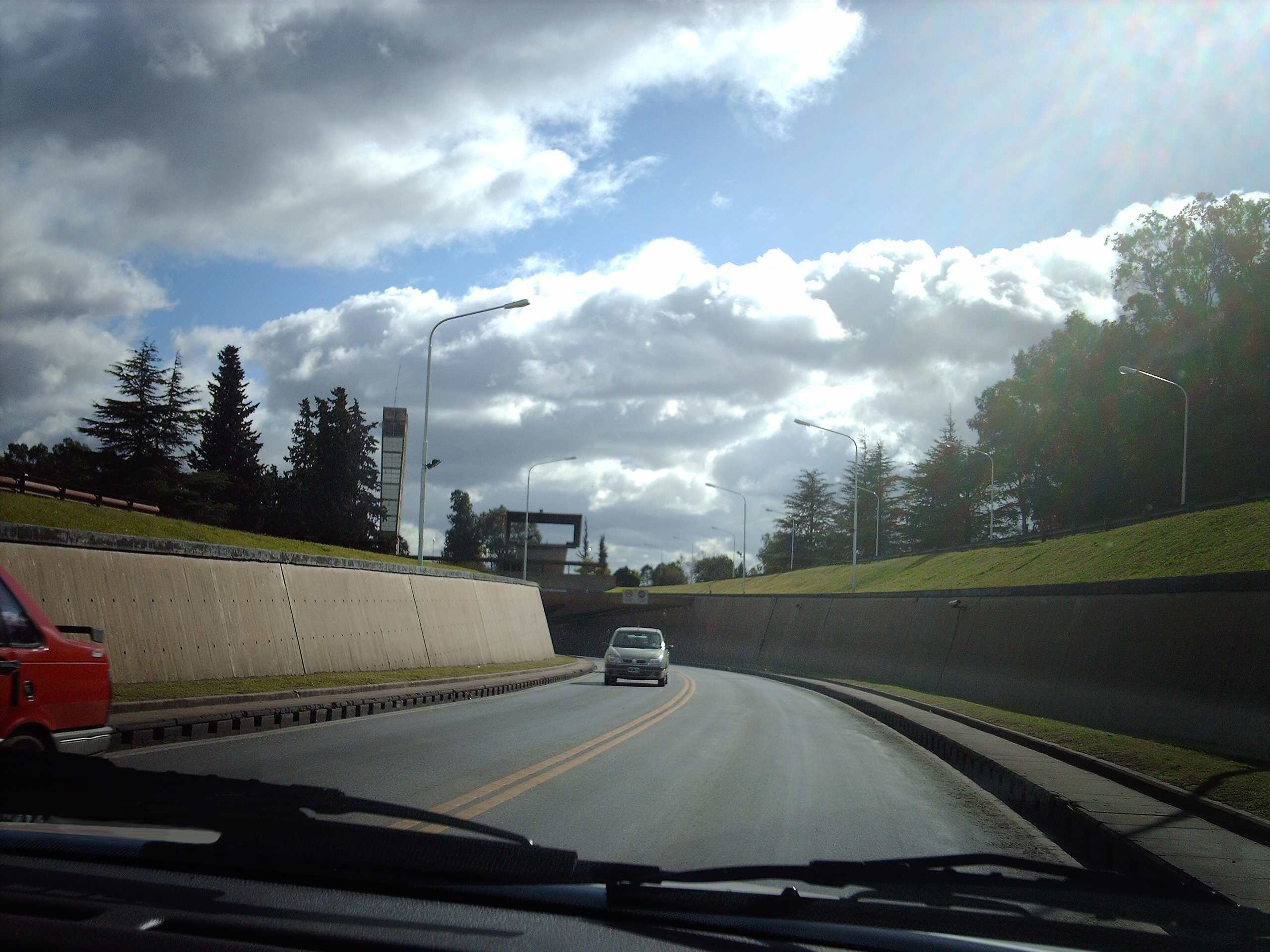 Ingreso al Túnel Subfluvial Paraná-Santa Fe. El Túnel subfluvial Raúl Uranga - Carlos Sylvestre Begnis, antes llamado "Túnel subfluvial Hernandarias", une por debajo del lecho del río Paraná, la ciudad argentina de Paraná (Entre Ríos) con la isla de Santa Cándida en la vecina provincia de Santa Fe, comunicando las redes de tránsito rodado de ambas provincias.